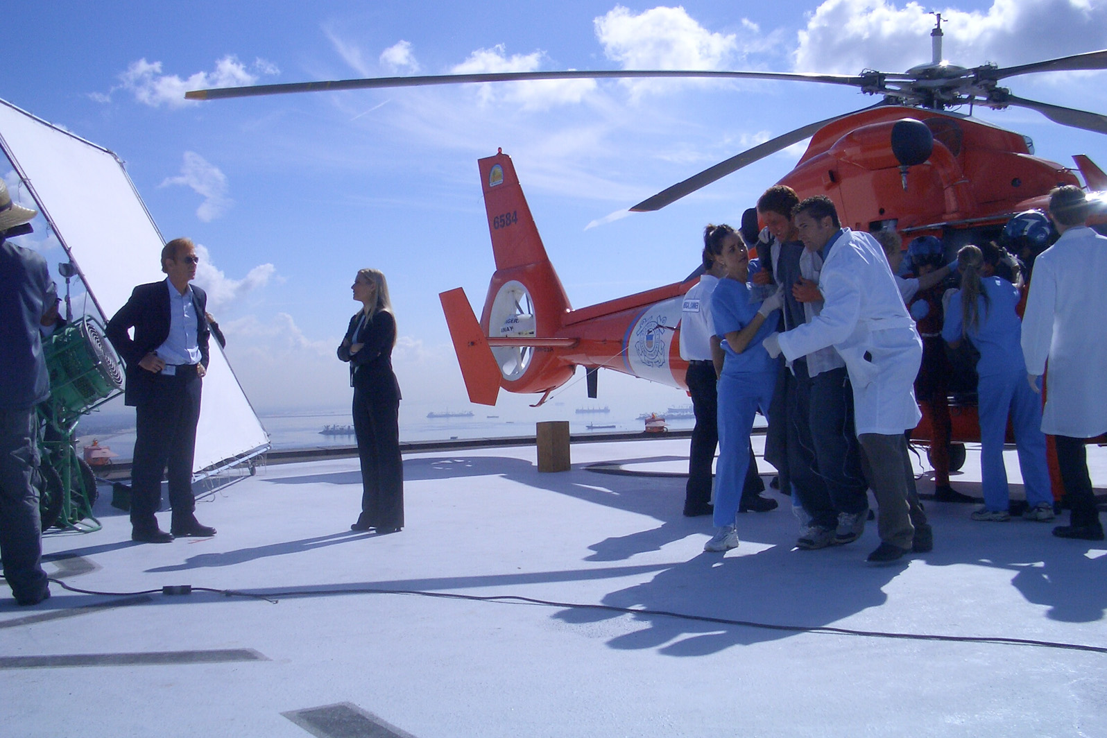 CSI: Miami